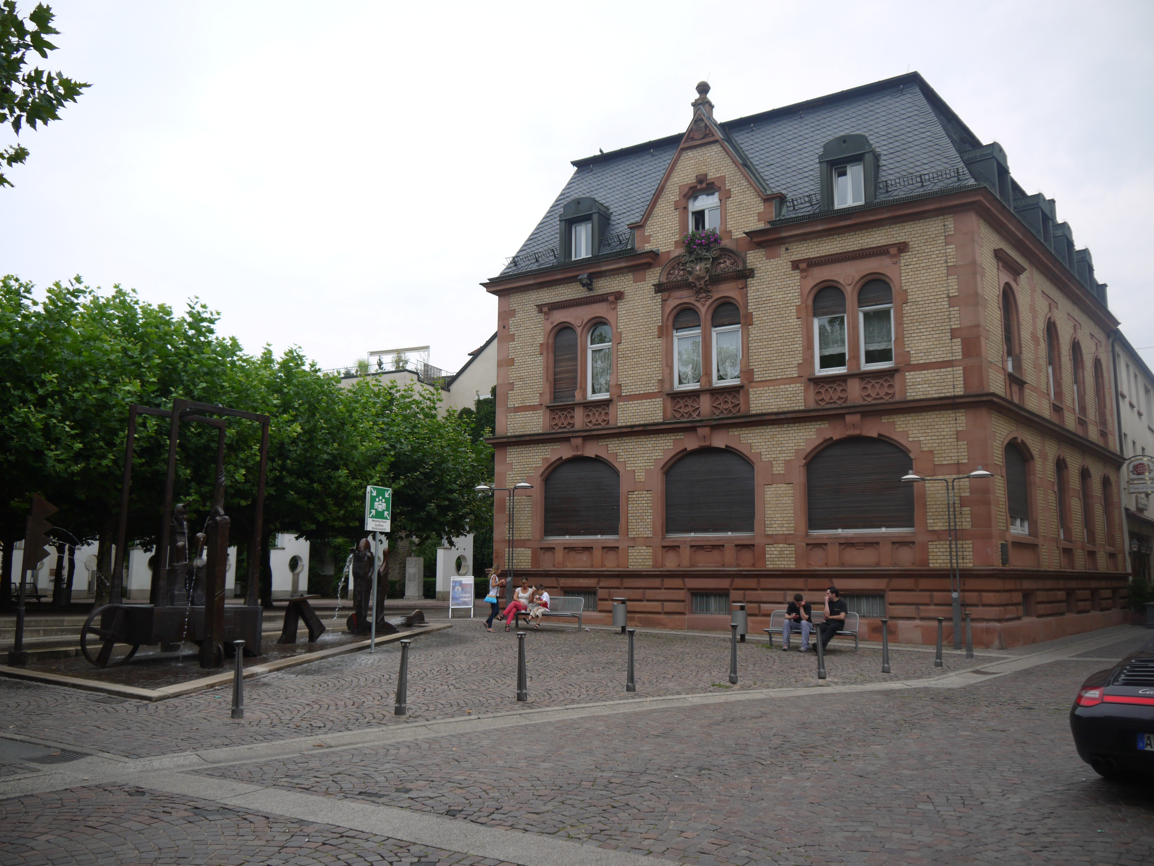 Treibgasse 20, ehemaliges Rabbinatsgebäude am Wolfsthalplatz in Aschaffenburg